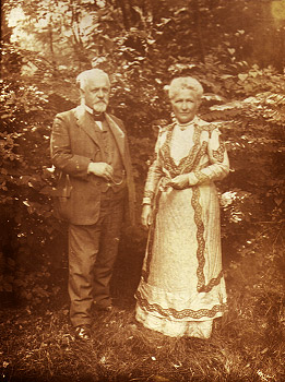 Alois Svoboda (1852 - 1929), Velkostatkář, československý vlastenec a mecenáš s manželkou na zahradě trojského zámku.